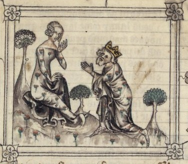 Peter I of Cyprus